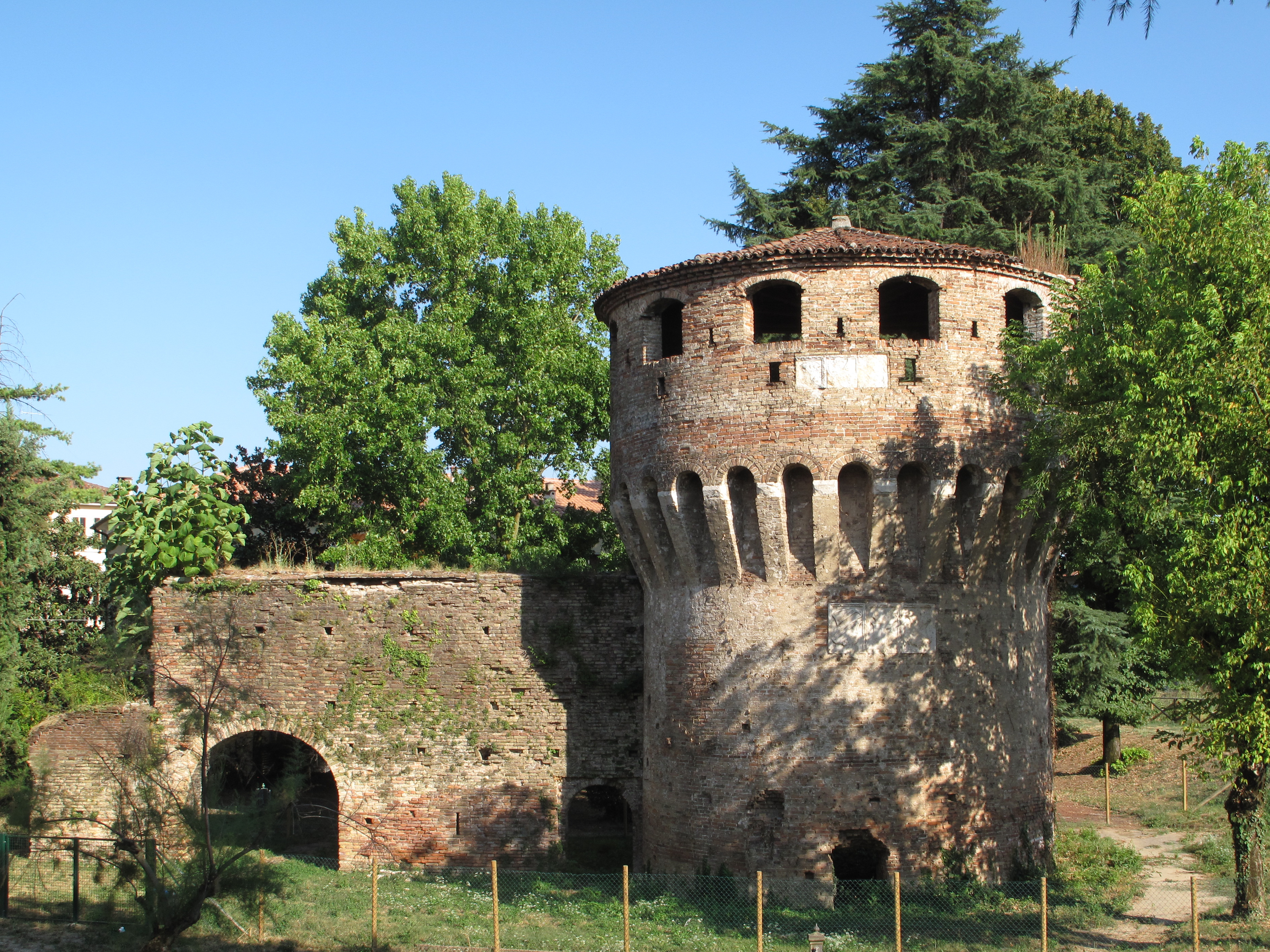 Vicenza - Mura veneziane - Torrione presso Porta Santa Croce